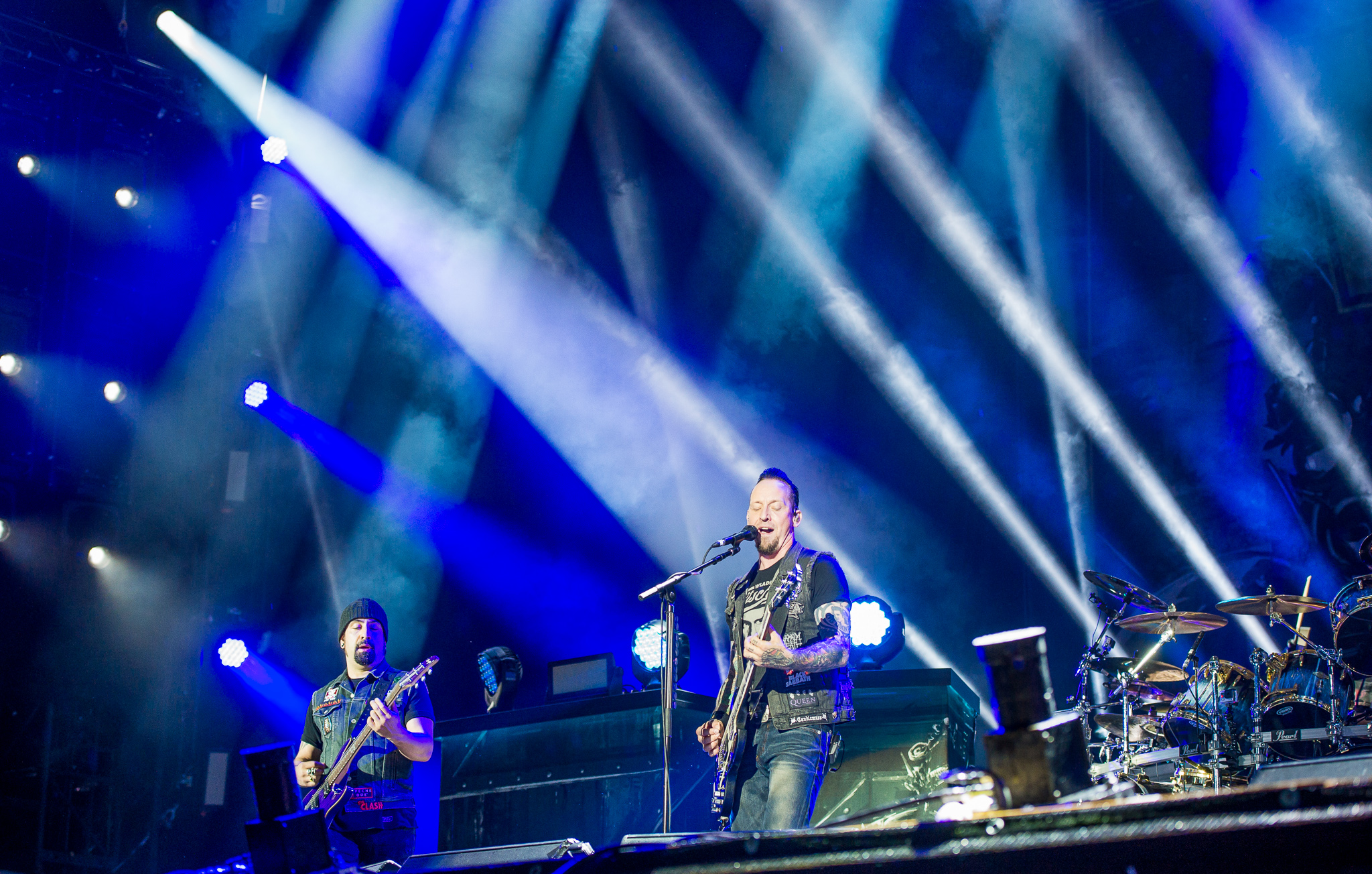 ARGO-Konzerte,Festival,Konzert,Livekonzert,Livemusik,Michael Schøn Poulsen,Musik,RiP,Rob Caggiano,Rock im Park 2016,Seat Zeppelin Stage,Volbeat